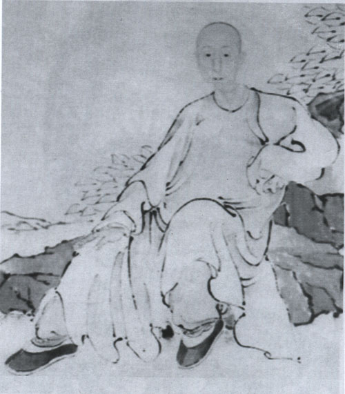 吴郁生（1854年－1940年），字蔚若，号钟斋、钝斋，晚号钝叟，江苏苏州人。清末重臣，1910年末代军机大臣。